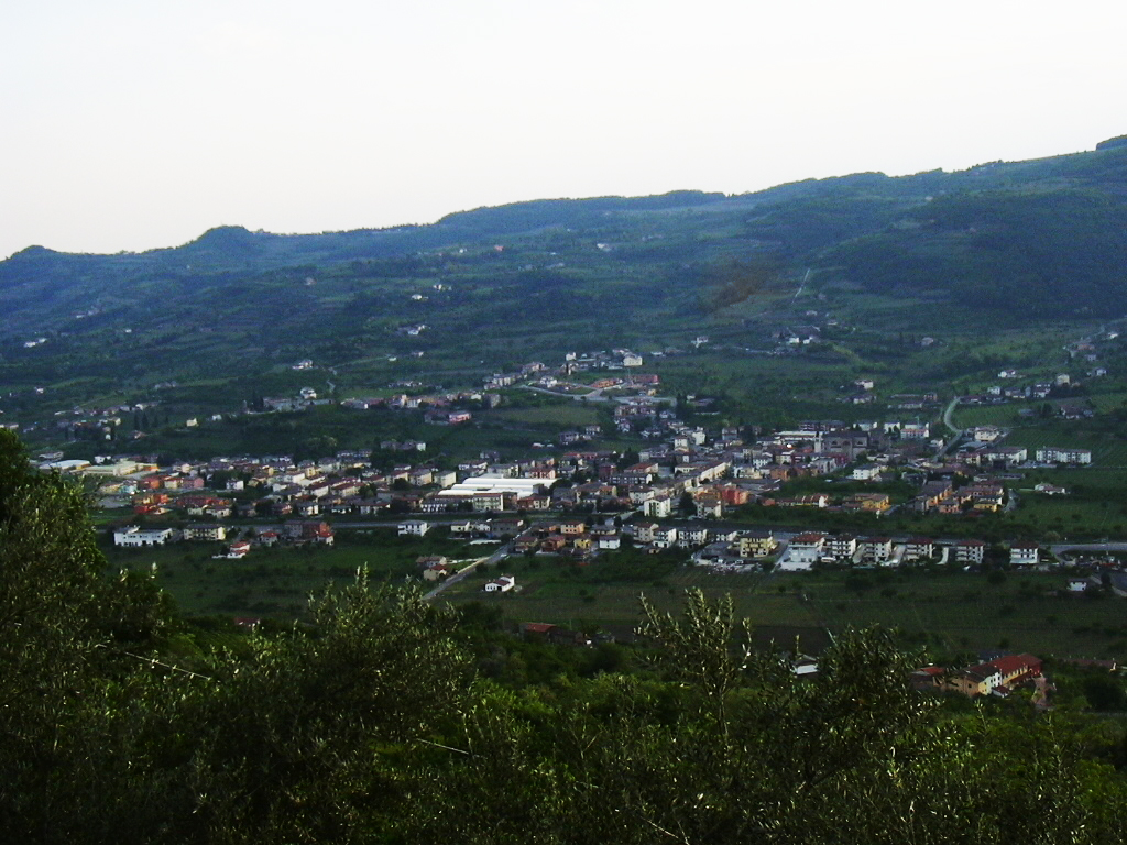 Montecchia di Crosara vista dal monte Calvarina